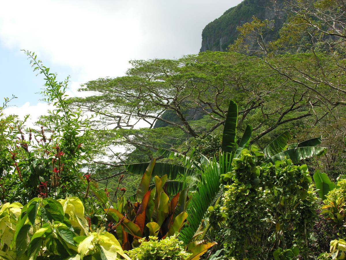 Seychelles, Mahé Island